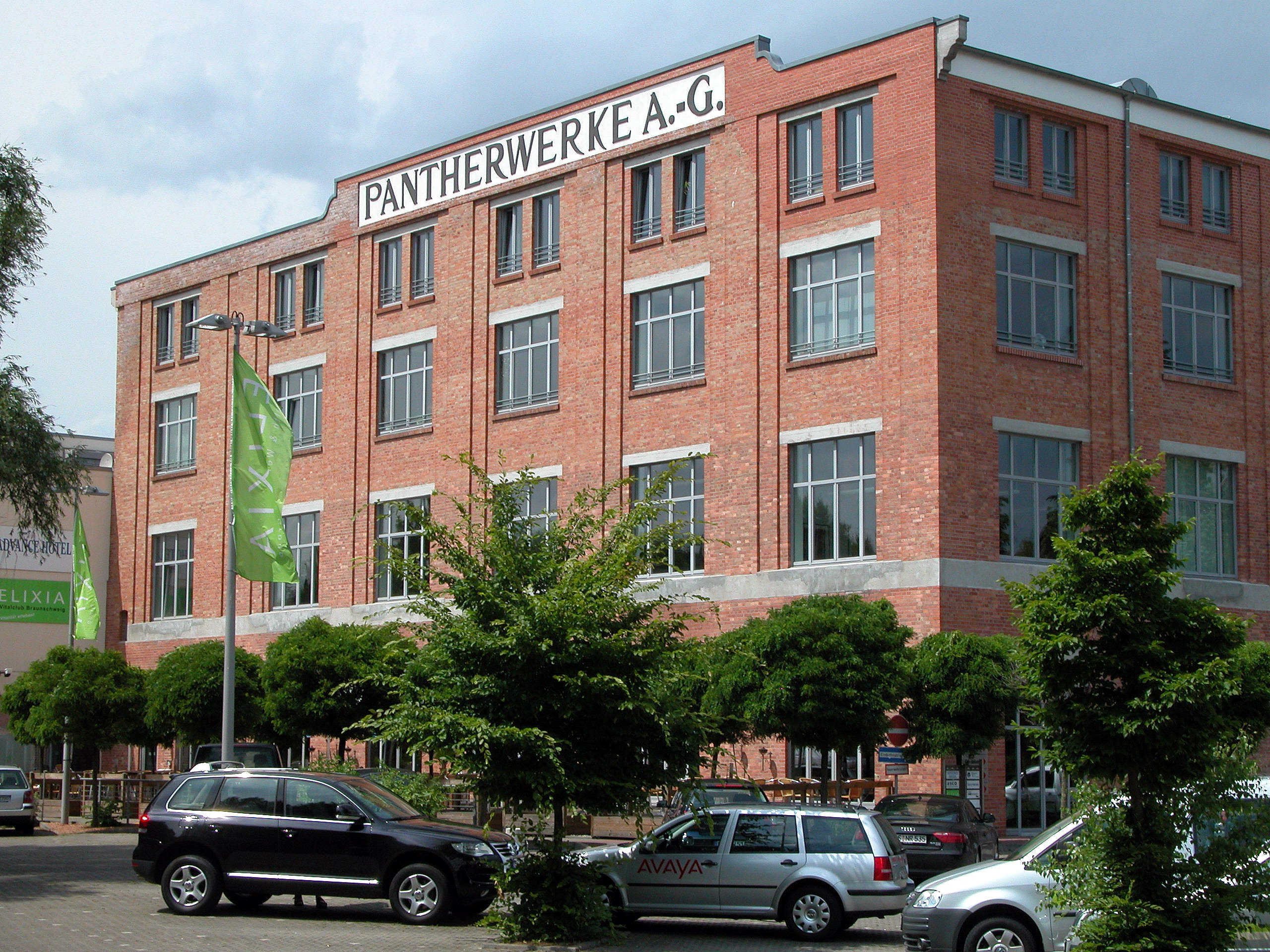 Braunschweig: Altes, mittlerweile umgewidmetes Werksgebäude der Pantherwerke AG. Braunschweig, Germany: Old Panther Works building now turned into an office building.